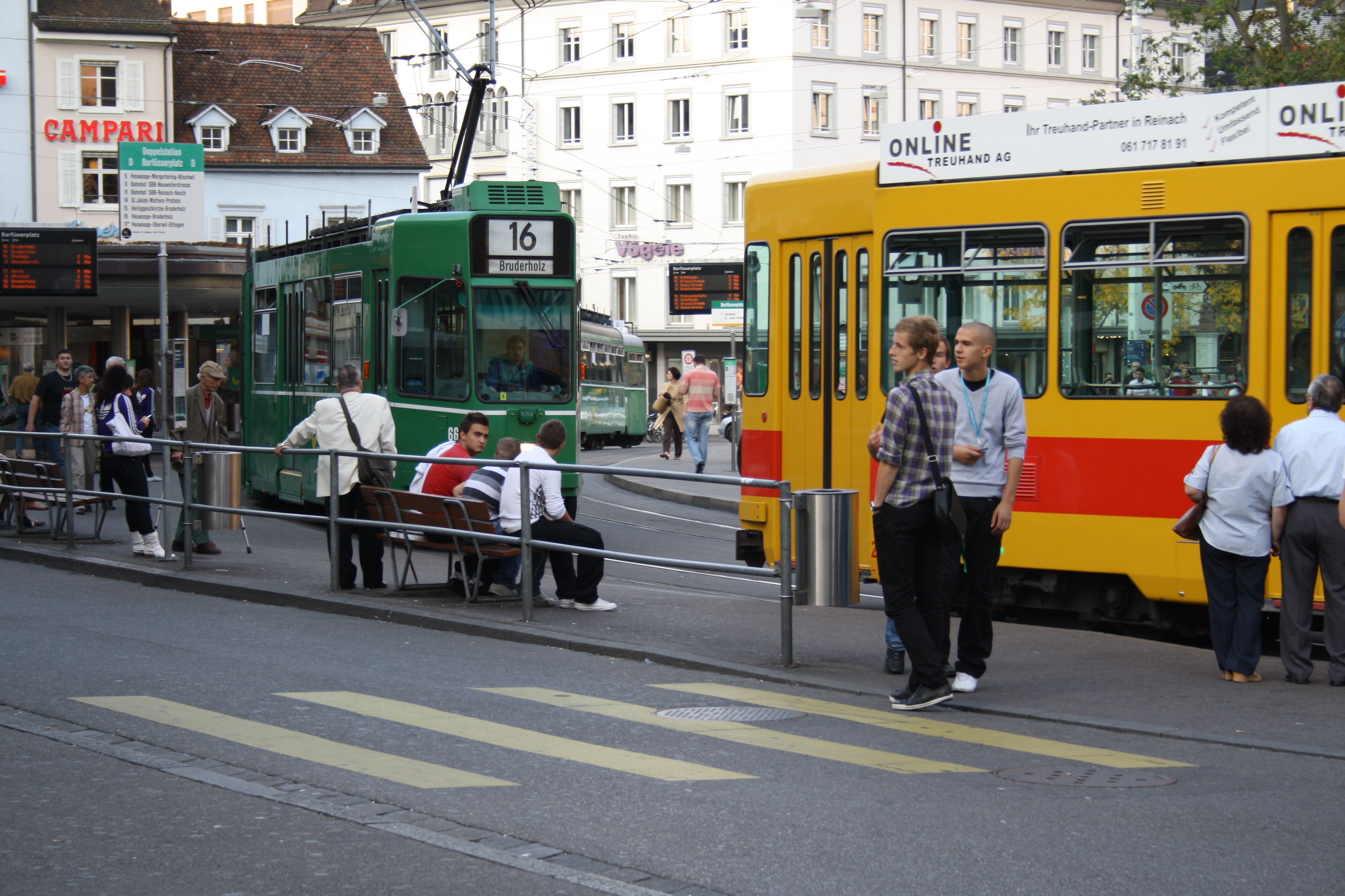 Basel Tram Linie 16 Barfüsserplatz